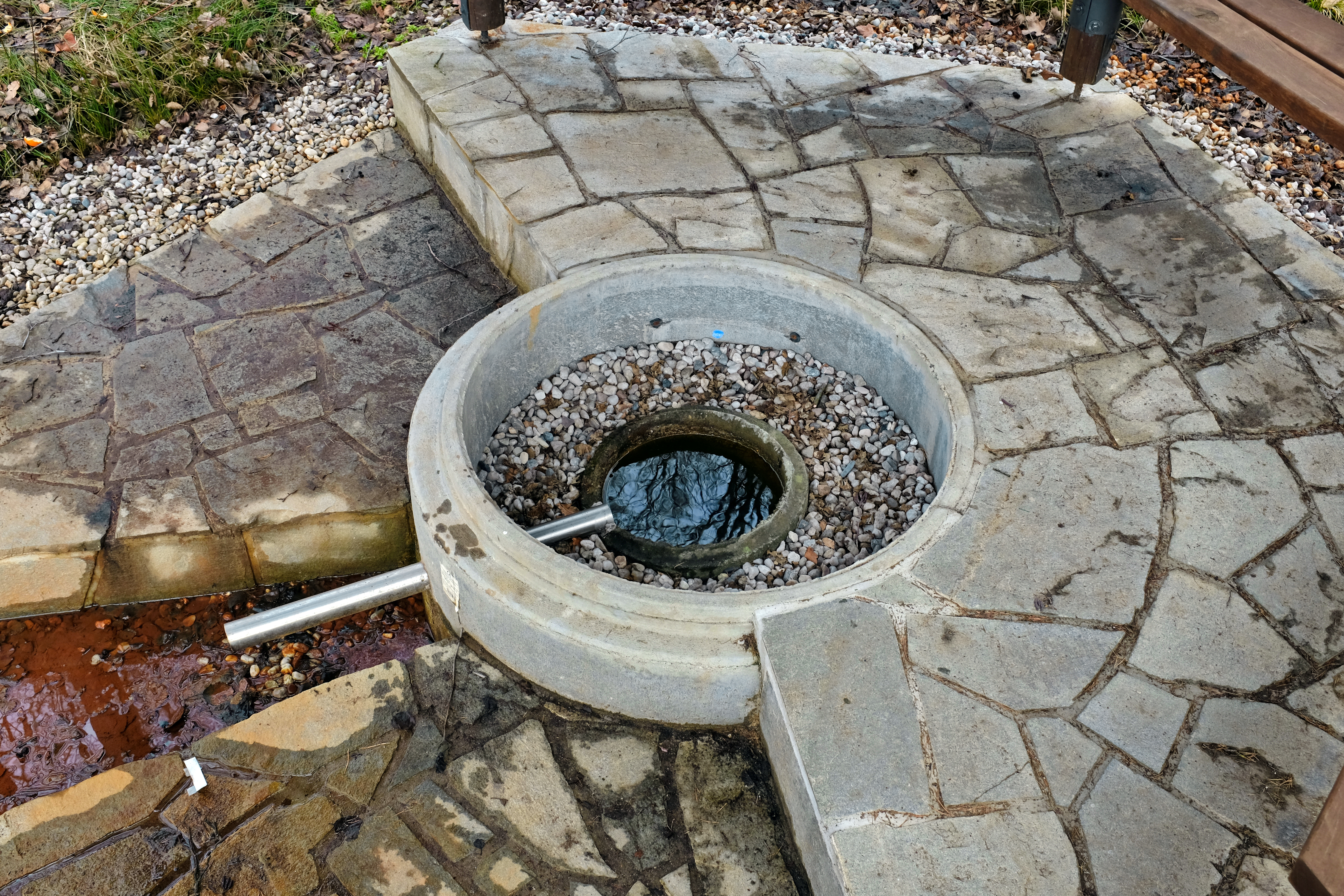 Minerální pramen v nivě Svažeckého potoka u Kopaniny, okres Cheb